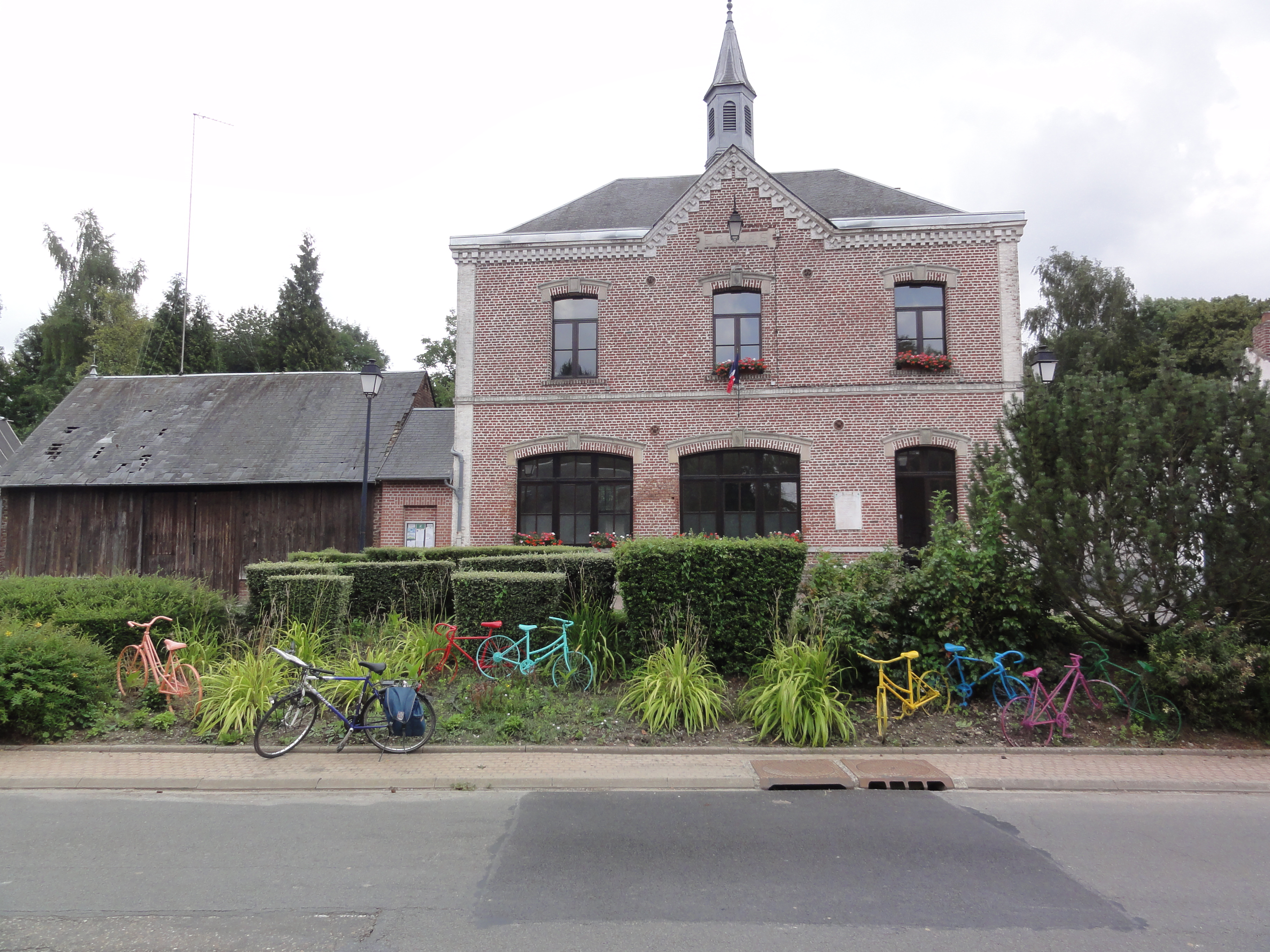 Essigny-le-Petit (Aisne) mairie (avec bicyclettes)